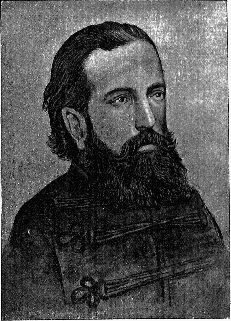 Coronel de G. N. Don Miguel F. Martinez de Hoz.